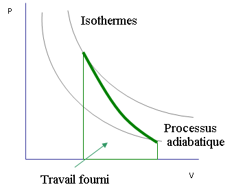 Changement de Pression et Volume d'une parcelle d'air selon un changement adiabatique.